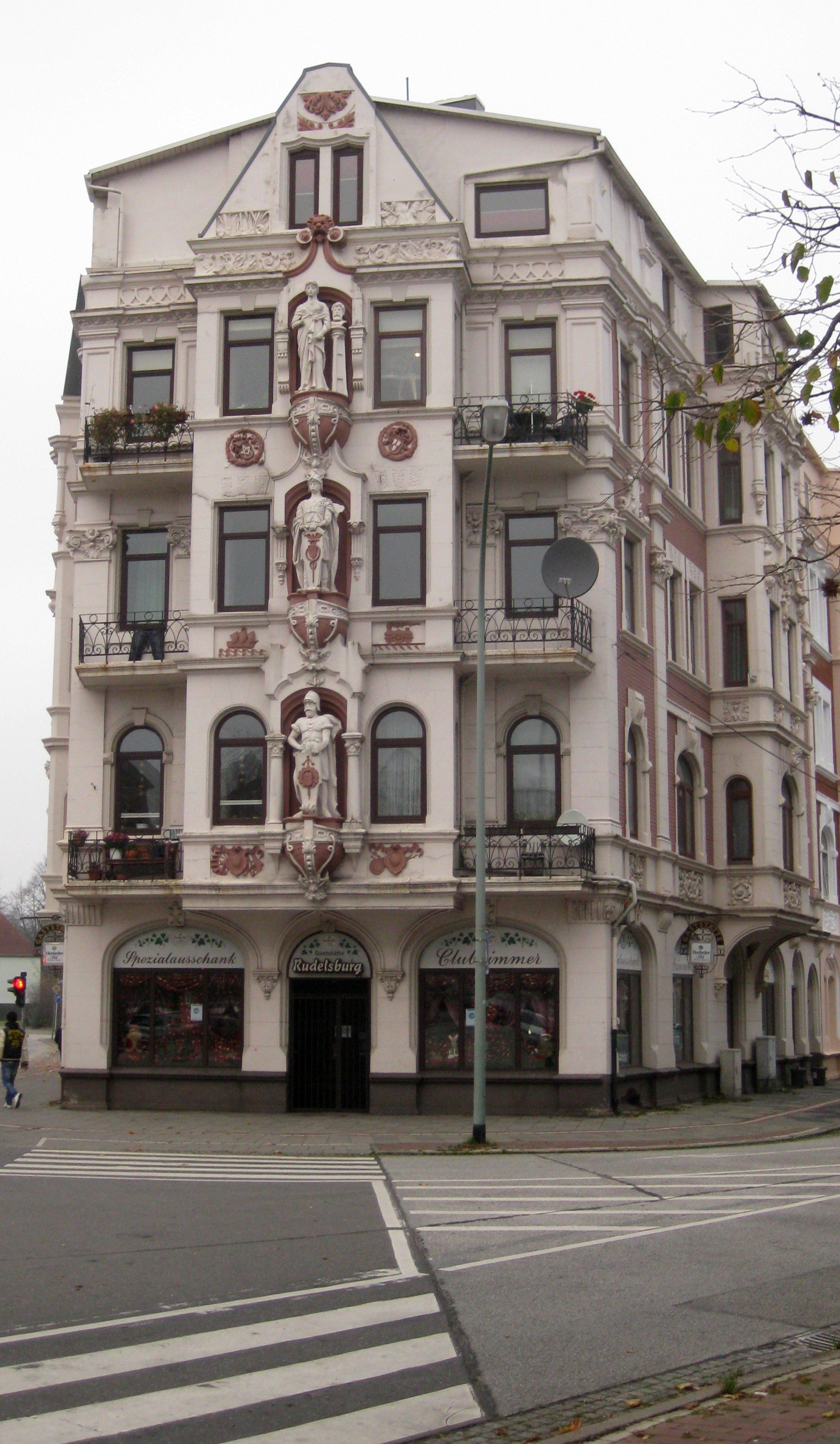 Rudelsburg in Bremerhaven Ecke Pestalozzi-/Goethestraße, in der NS-Zeit SA-Vereinslokal